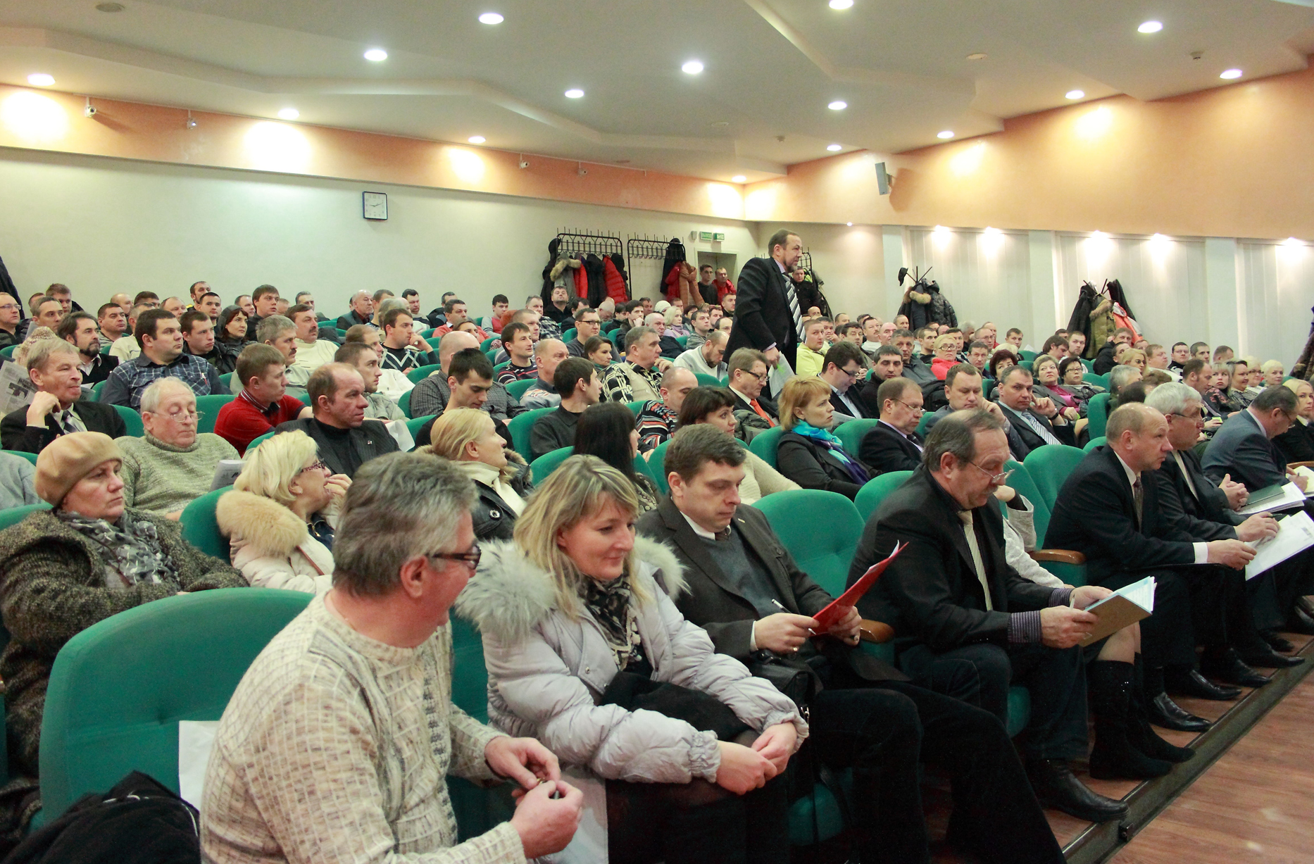 Канферэнцыя НПГ